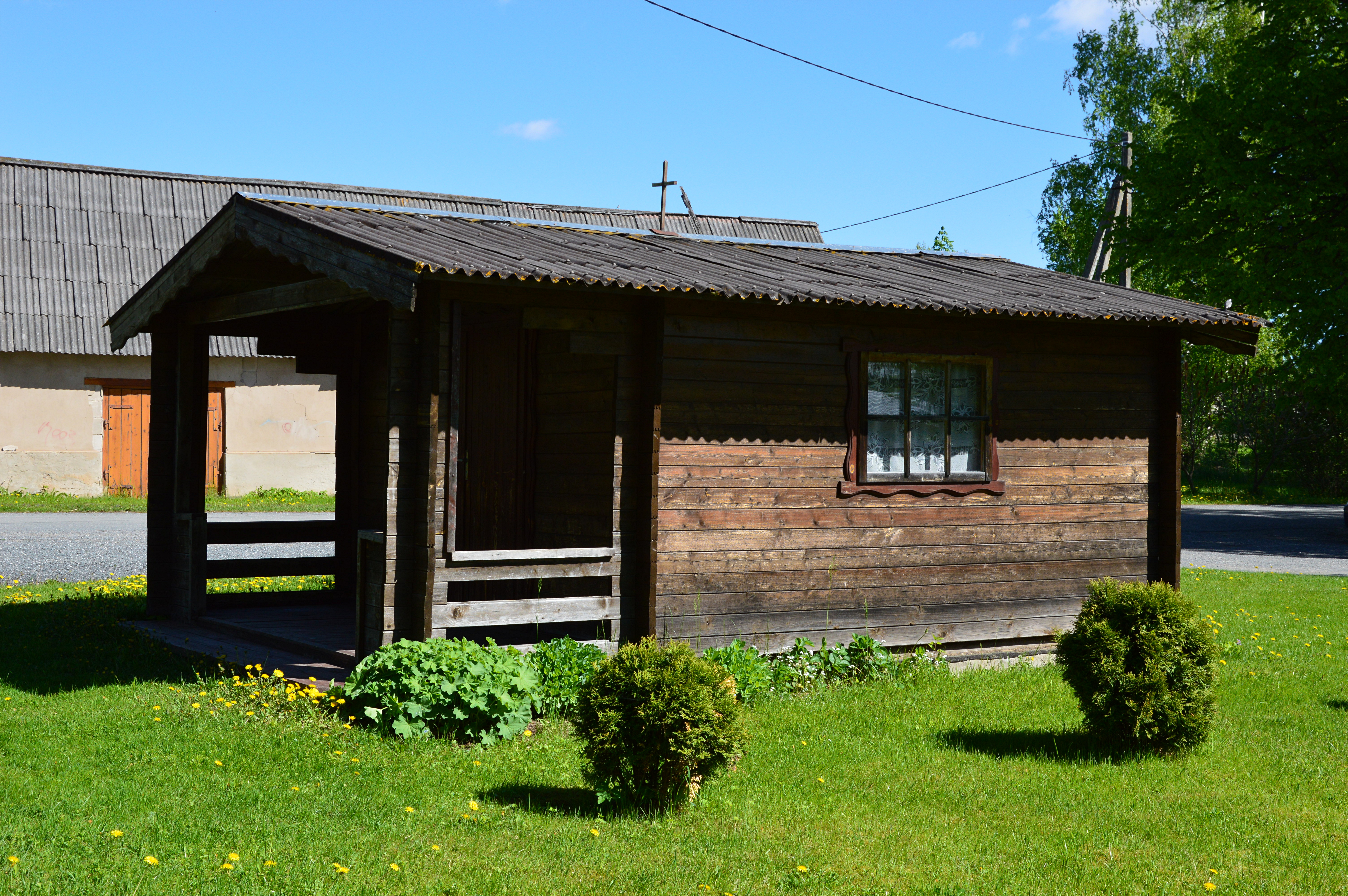 Mikitamäe uus tsässon.